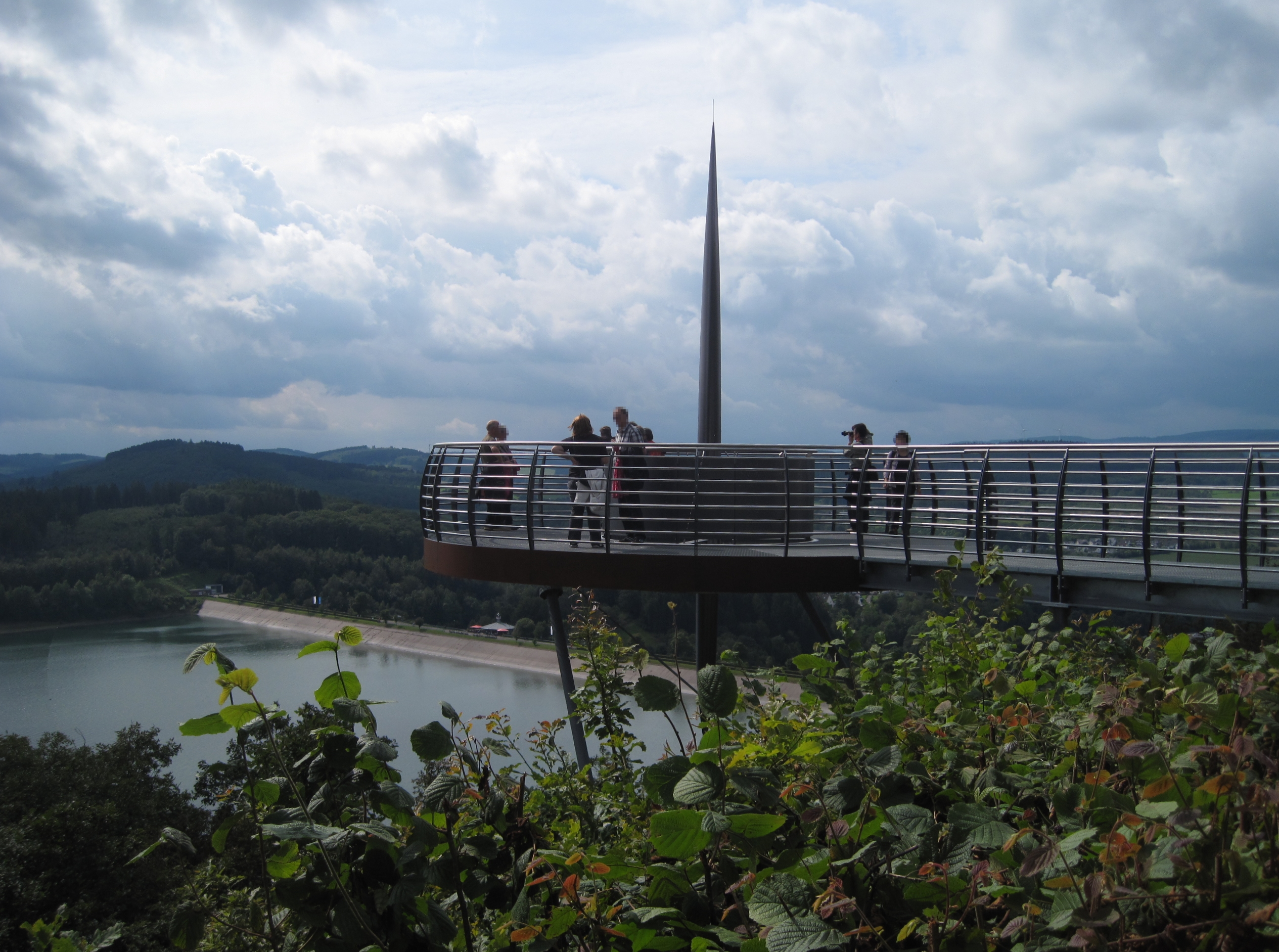 Aussichtsplattform Biggeblick (errichtet 2013) auf dem Dünneckenberg an der Biggetalsperre nahe der Kernstadt Attendorn.